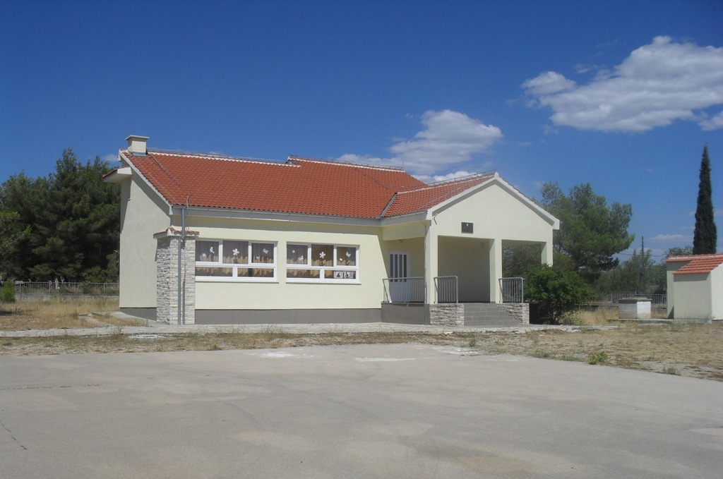 Osnovna škola u Bukoviću, kod grada Benkovca.